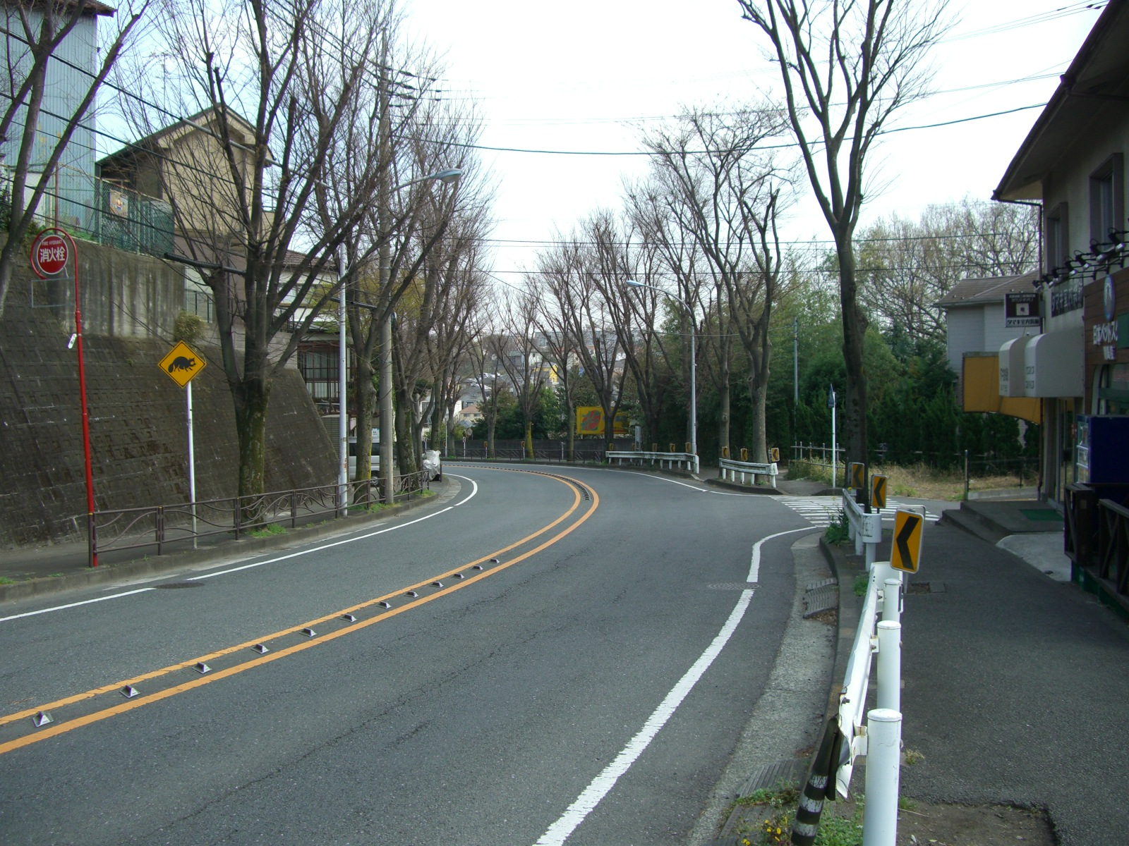 野川 権六坂 タヌキに注意！